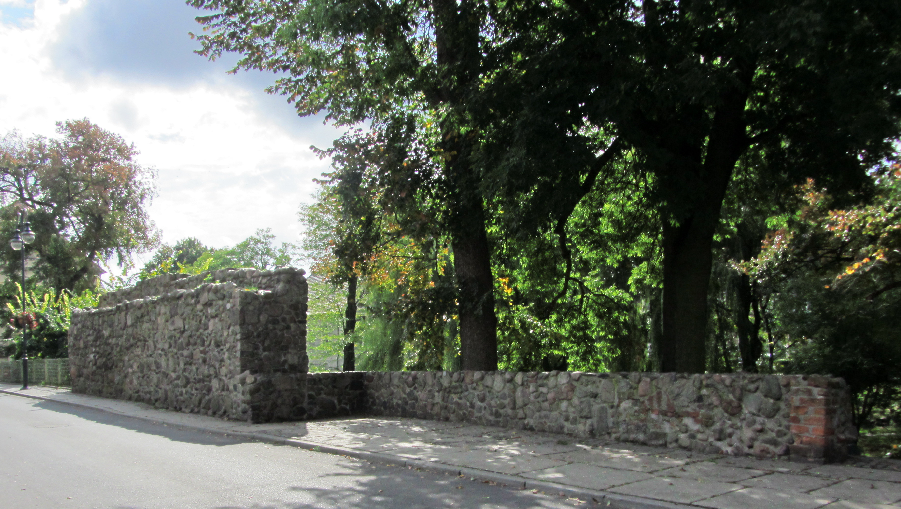 Świebodzin, ul. Okrężna - mury miejskie